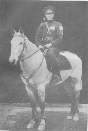 馬仲英騎馬照